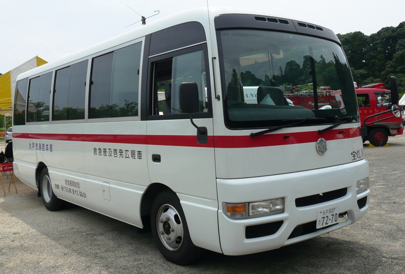 Nissan Civilian W41.